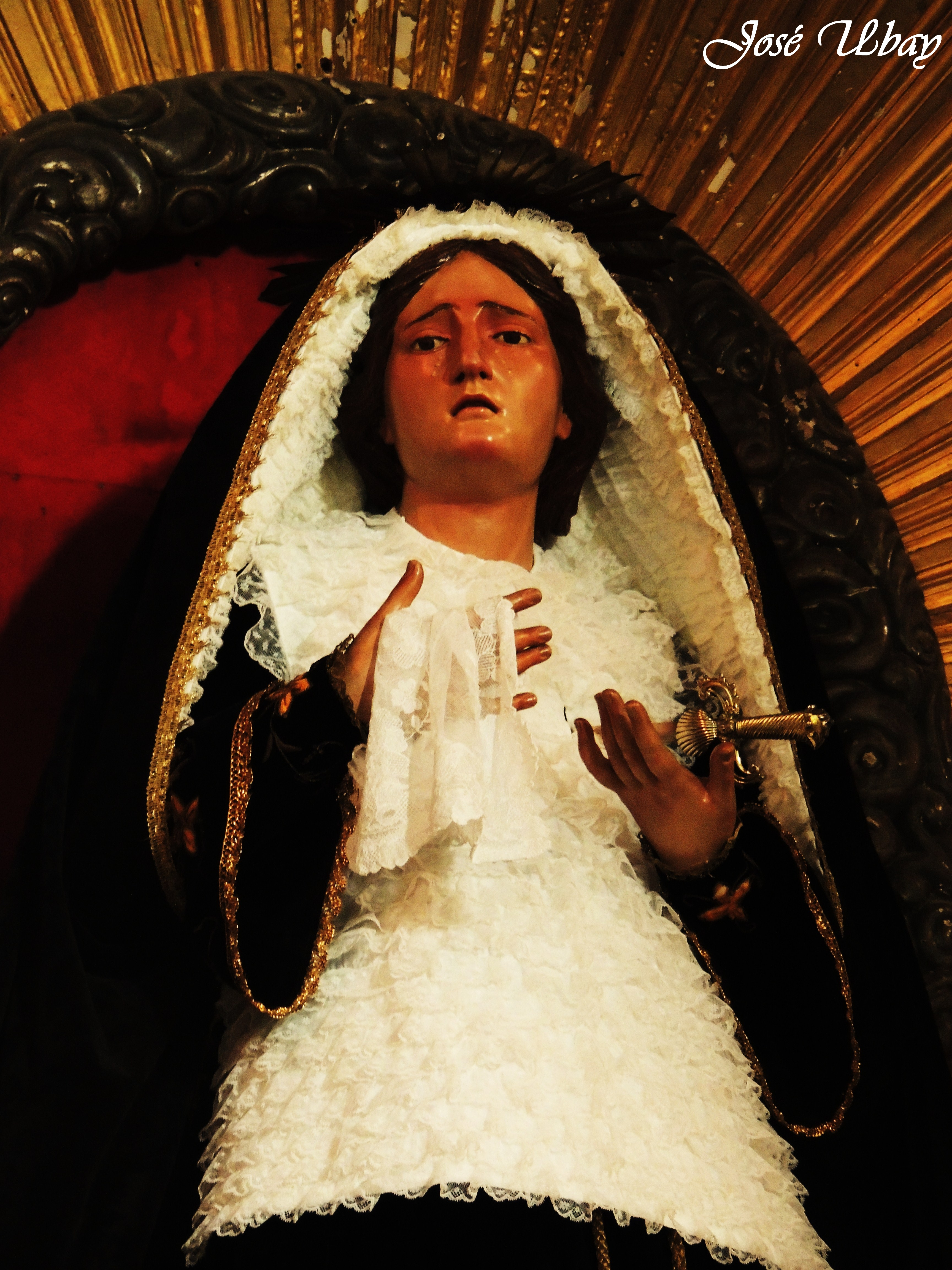 Nuestra Señora de la Soledad (1787). José Luján Pérez. Basílica de san Juan Bautista (Telde).